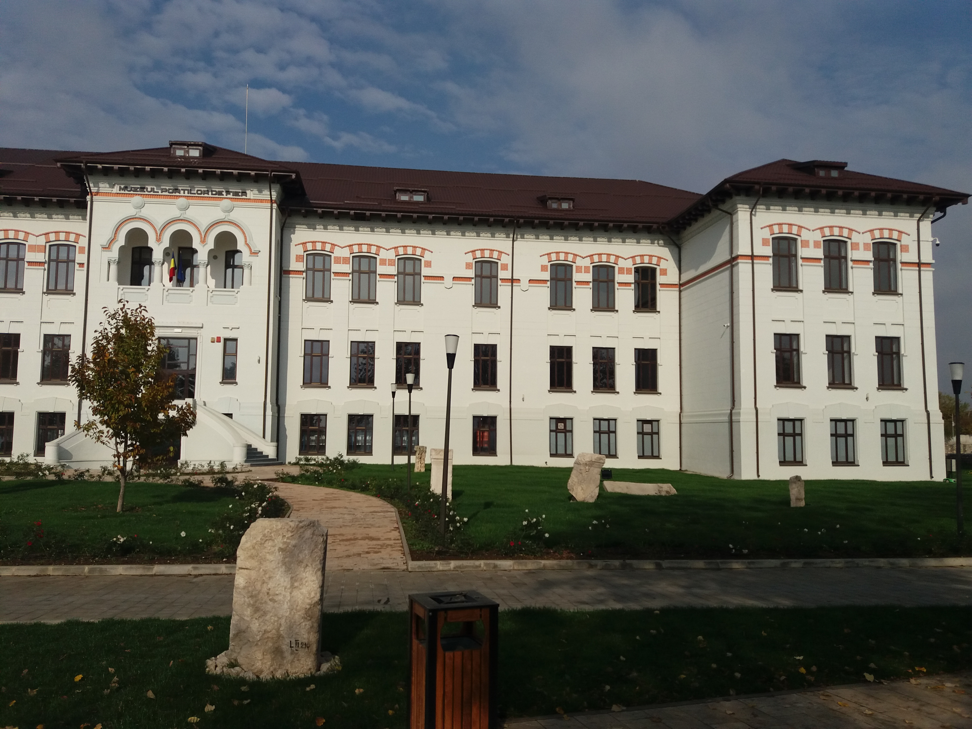 Muzeul Regiunii Porților de Fier este un muzeu regional din Drobeta-Turnu Severin, amplasat în Str. Independenței nr. 2.